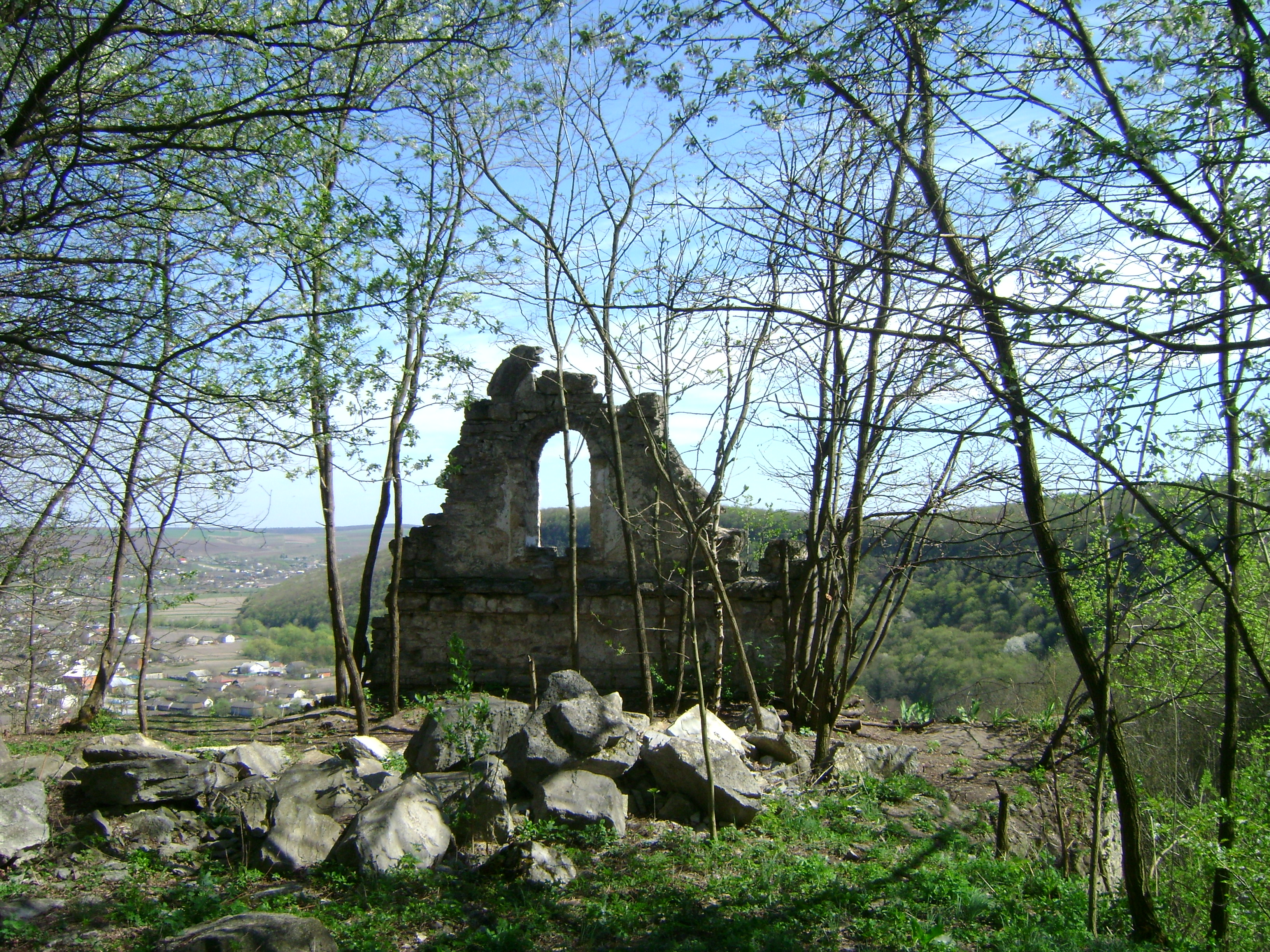 «Дача Галілея», Чортківський район, села: Улашківці, Росохач, Сосулівка, Милівці, Залісся, Заболотівка, Борщівський район, с. Озеряни, Улашківське лісництво, кв.29-74, лісове урочище «Дача Галілея»